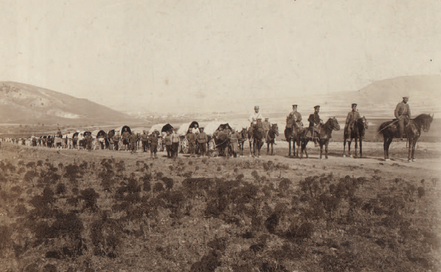 Подпоручик Атанас Стефанов води 6-та рота от 18-ти пех. Етърски полк, 1912 г.